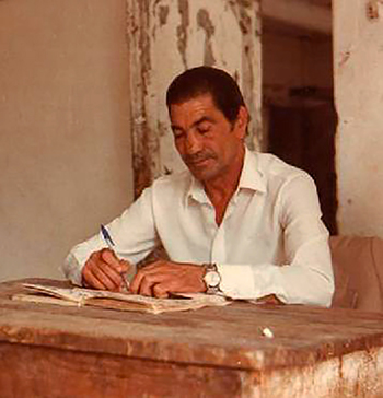 Salvatore Borelli